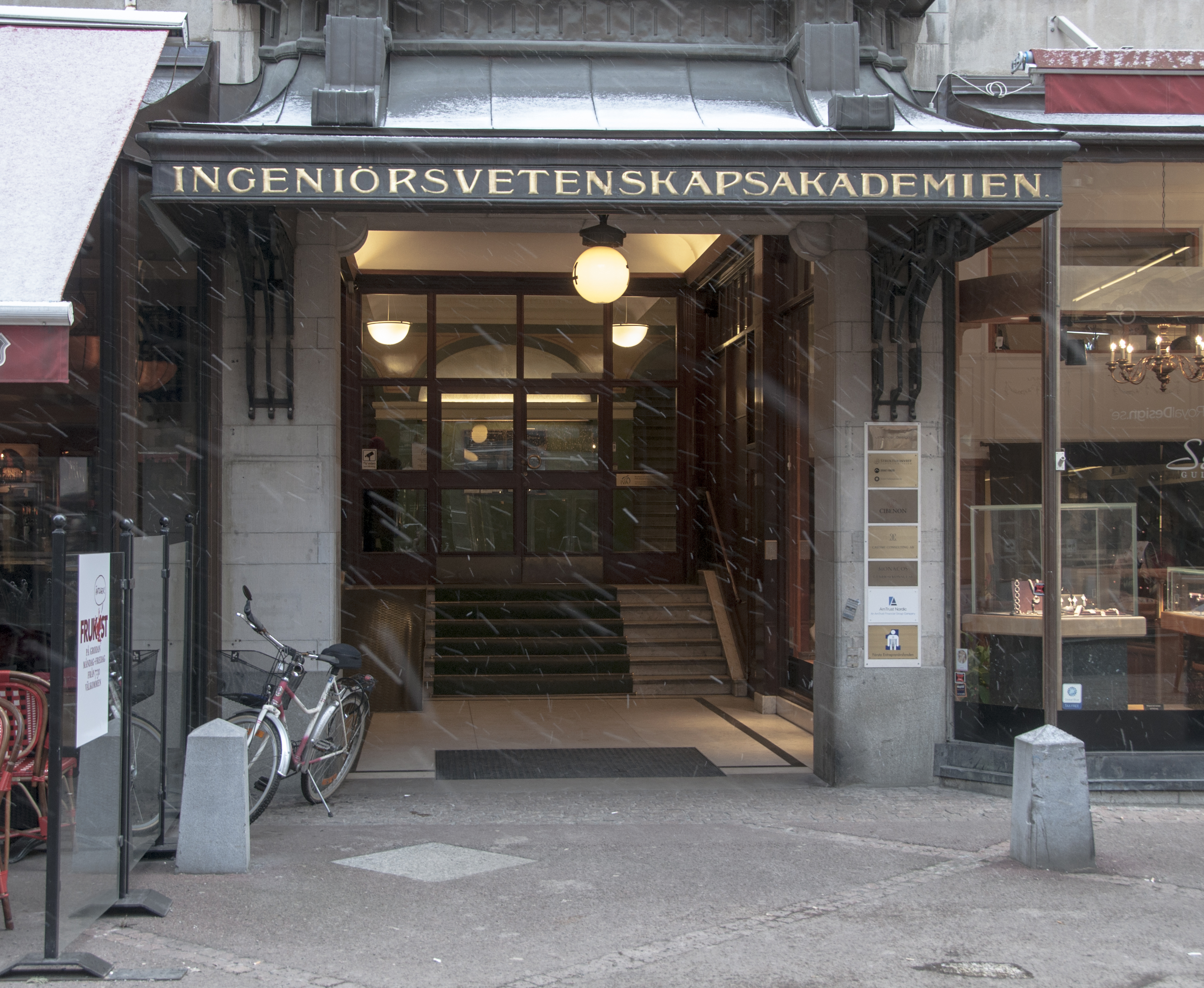 Riddaren 10, g) Grev Turegatan 12-16, Nybyggnadsår 1896 - 1899, Salin Kasper & Lindgren G. (Arkitekt) Stockholms Tattersall (Byggherre)